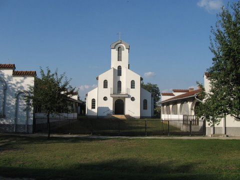 Šušara katolićka crkva. Marina Milan